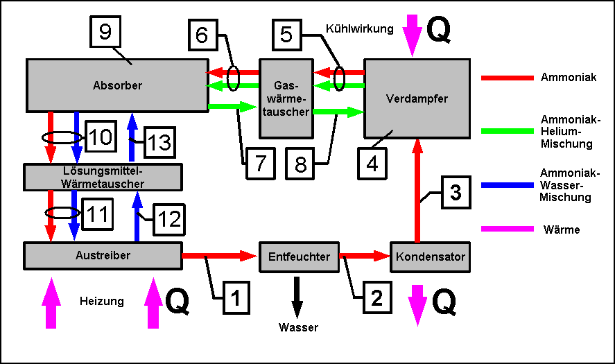 Funktionsweise einer Diffusionsabsorptionskältemaschine